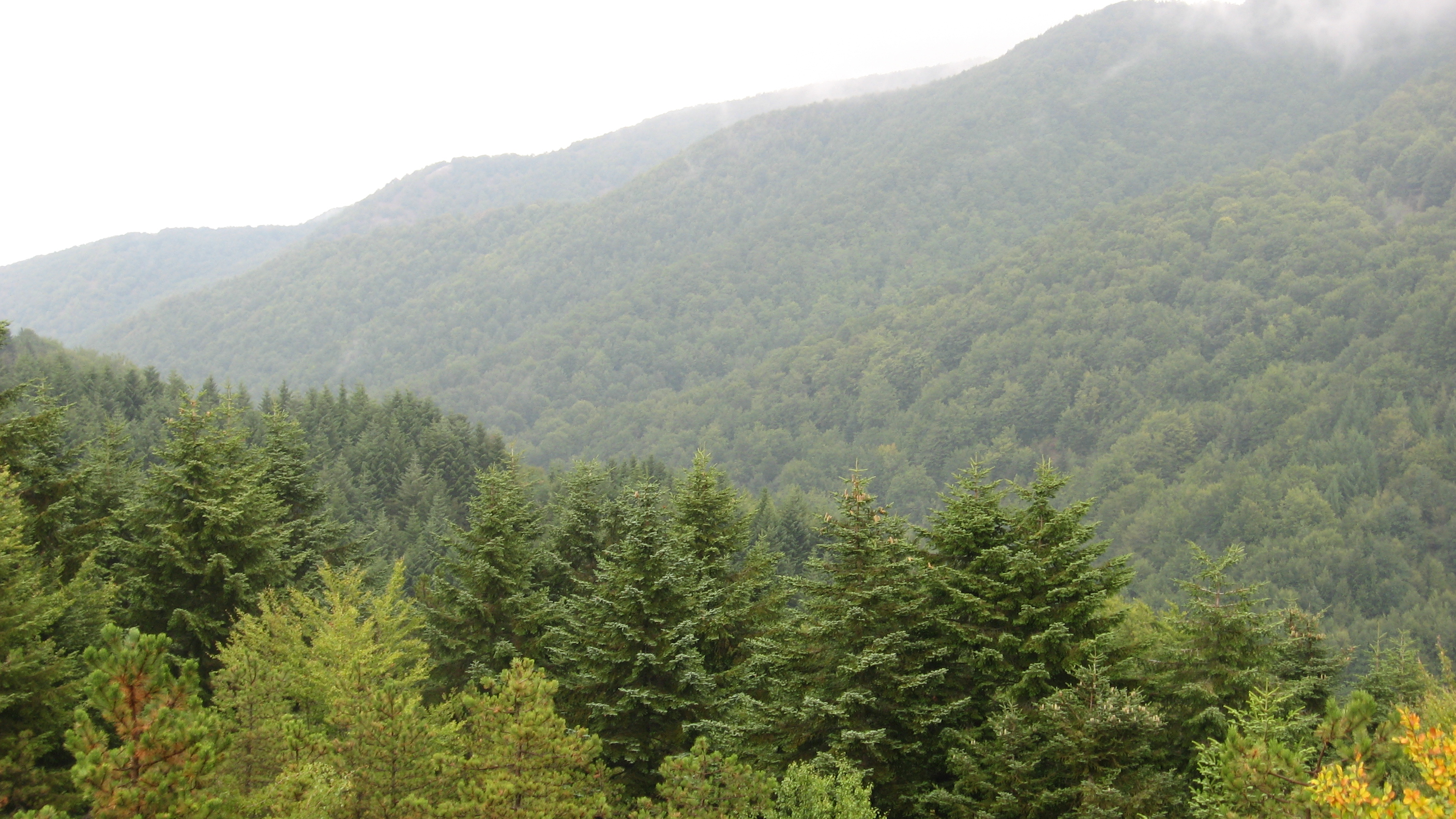 Monte Arioso e Fossa Cupa